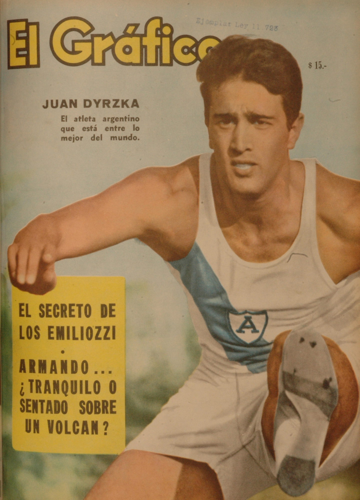 El Grafico del 19 de Junio de 1963. Edicion 2280